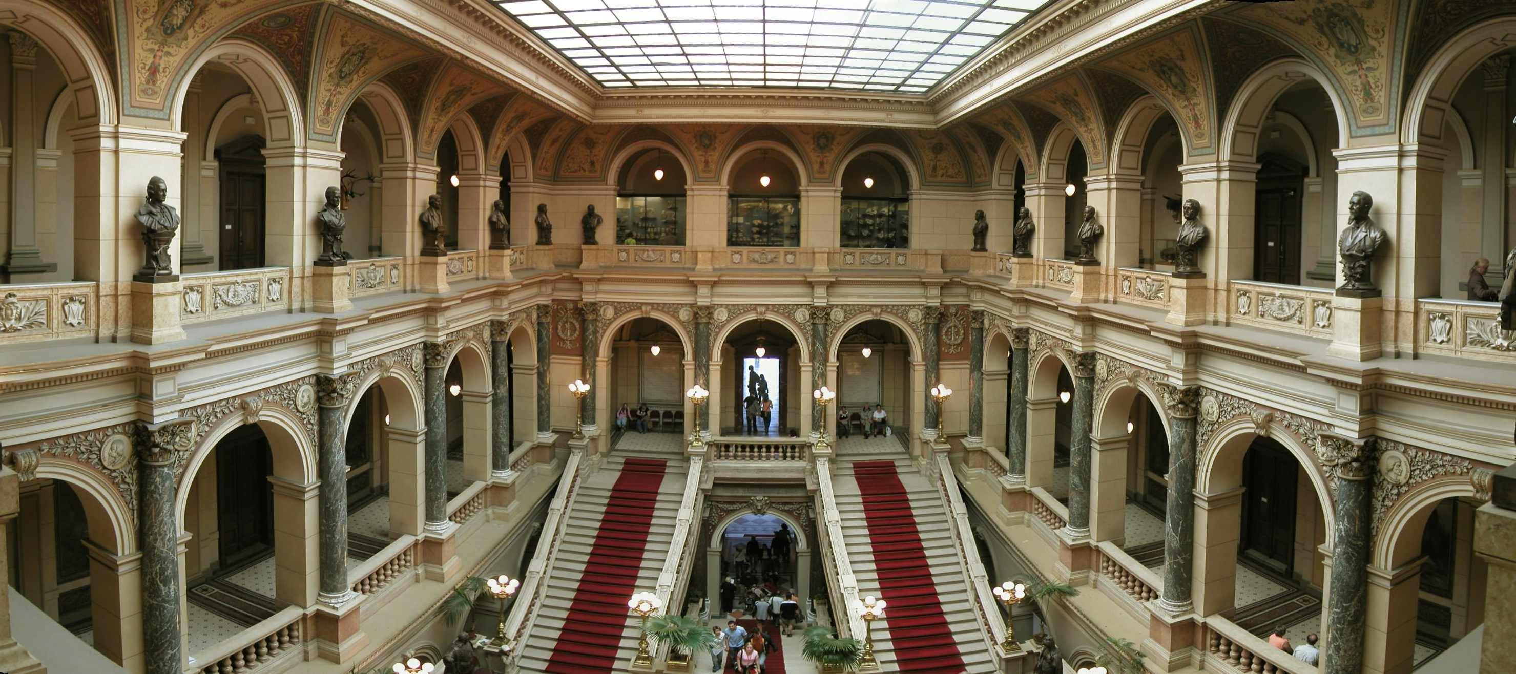 Innenansicht národní muzeum (Eingang)